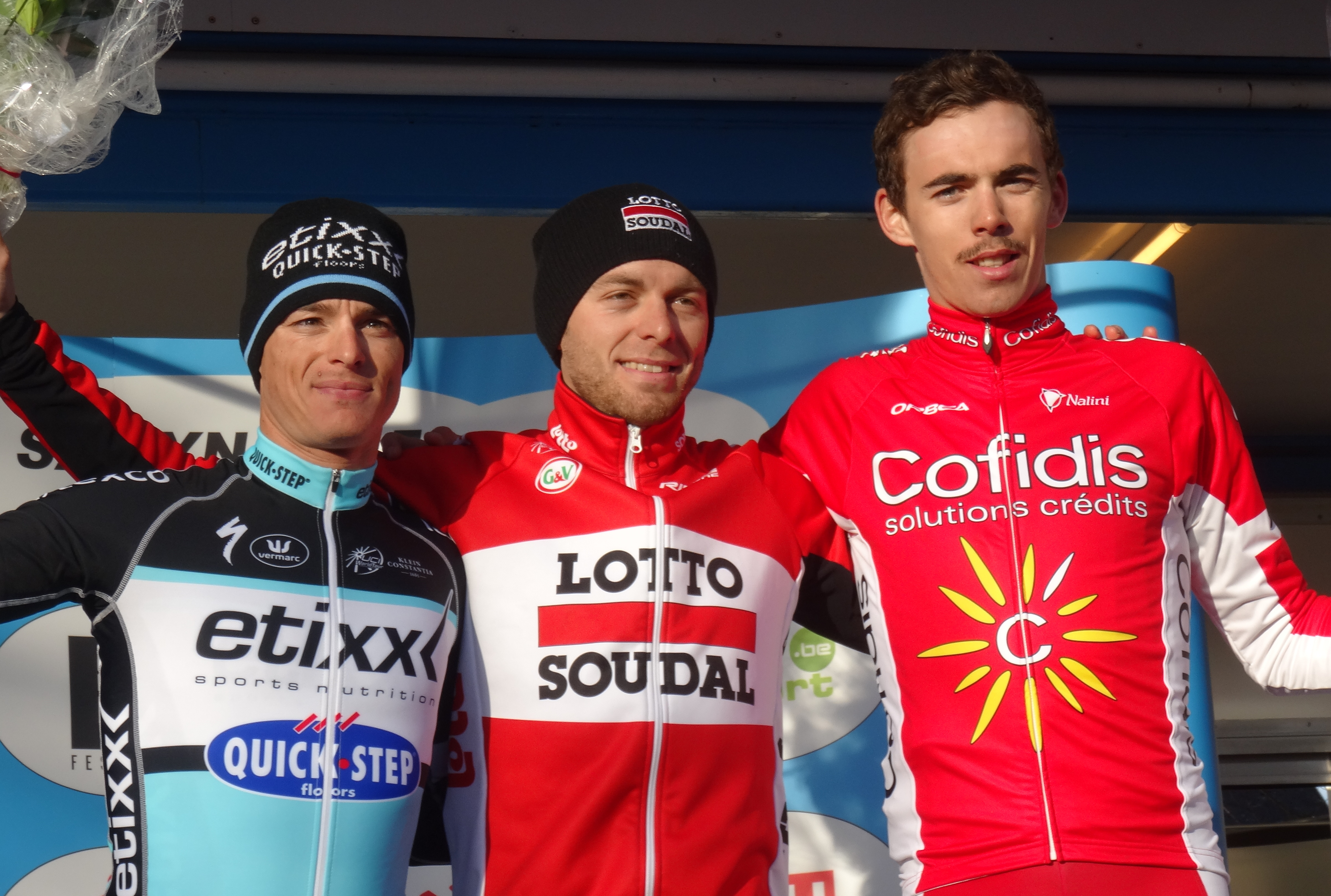 Reportage réalisé le mercredi 4 mars à l'occasion de l'arrivée du Samyn des Dames 2015 et du Samyn 2015 à Dour, Belgique.